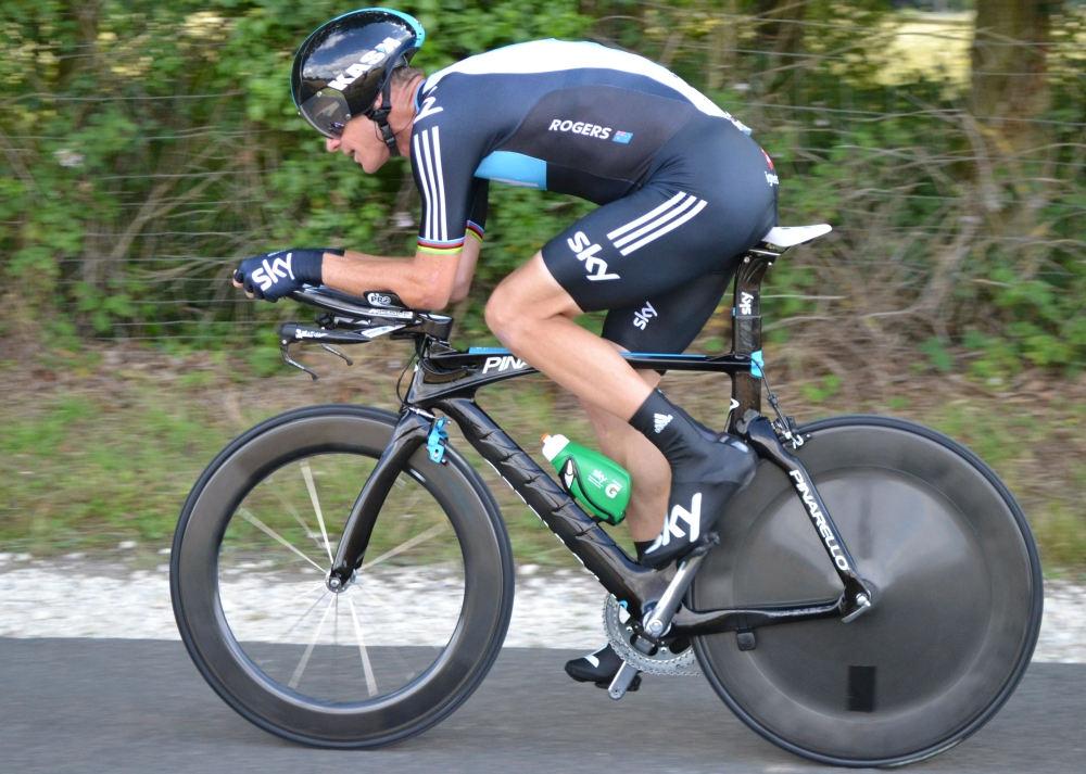 Michael Rogers TDF2012